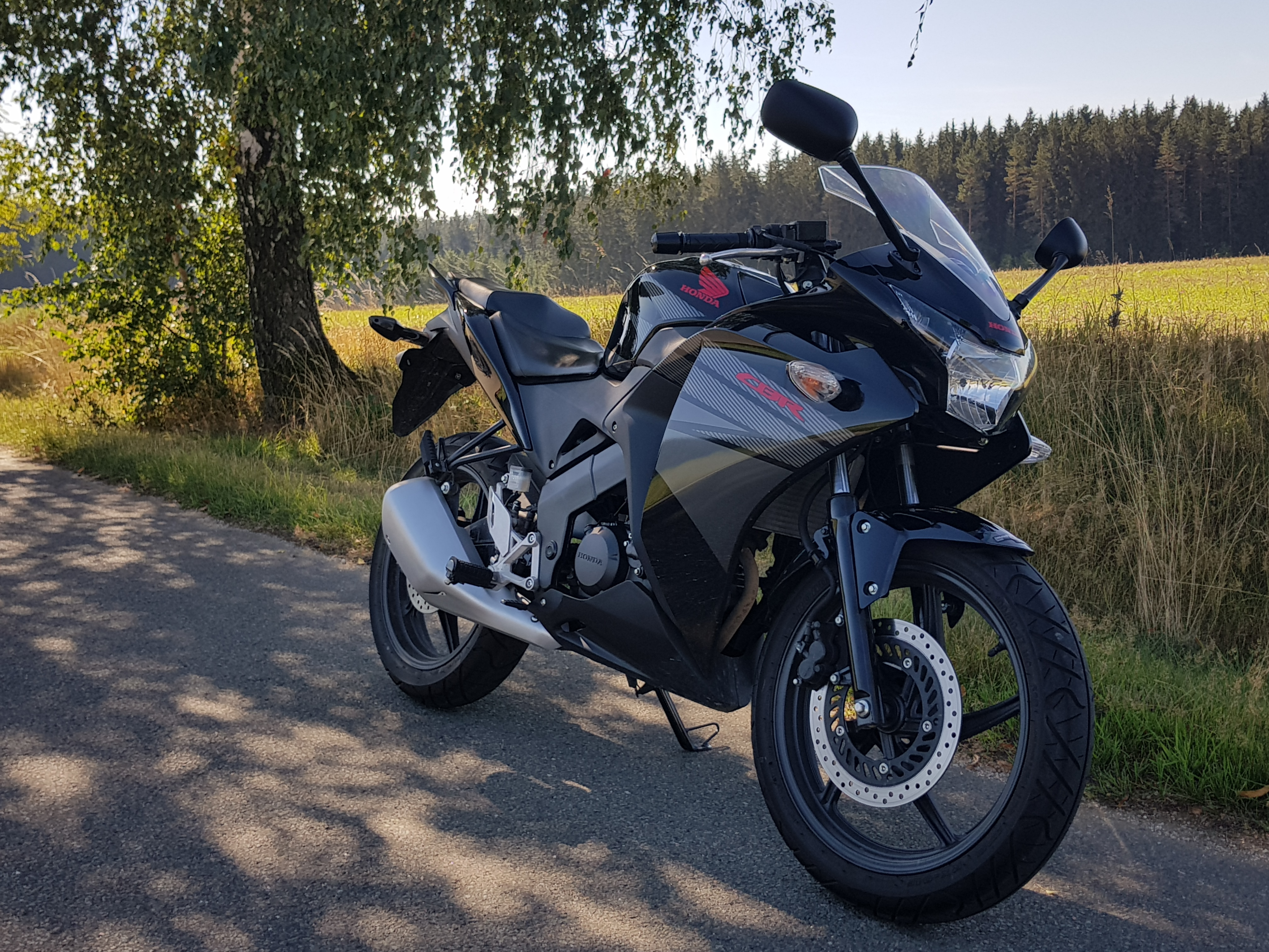 Honda CBR 125R (JC50), Bj. 2016